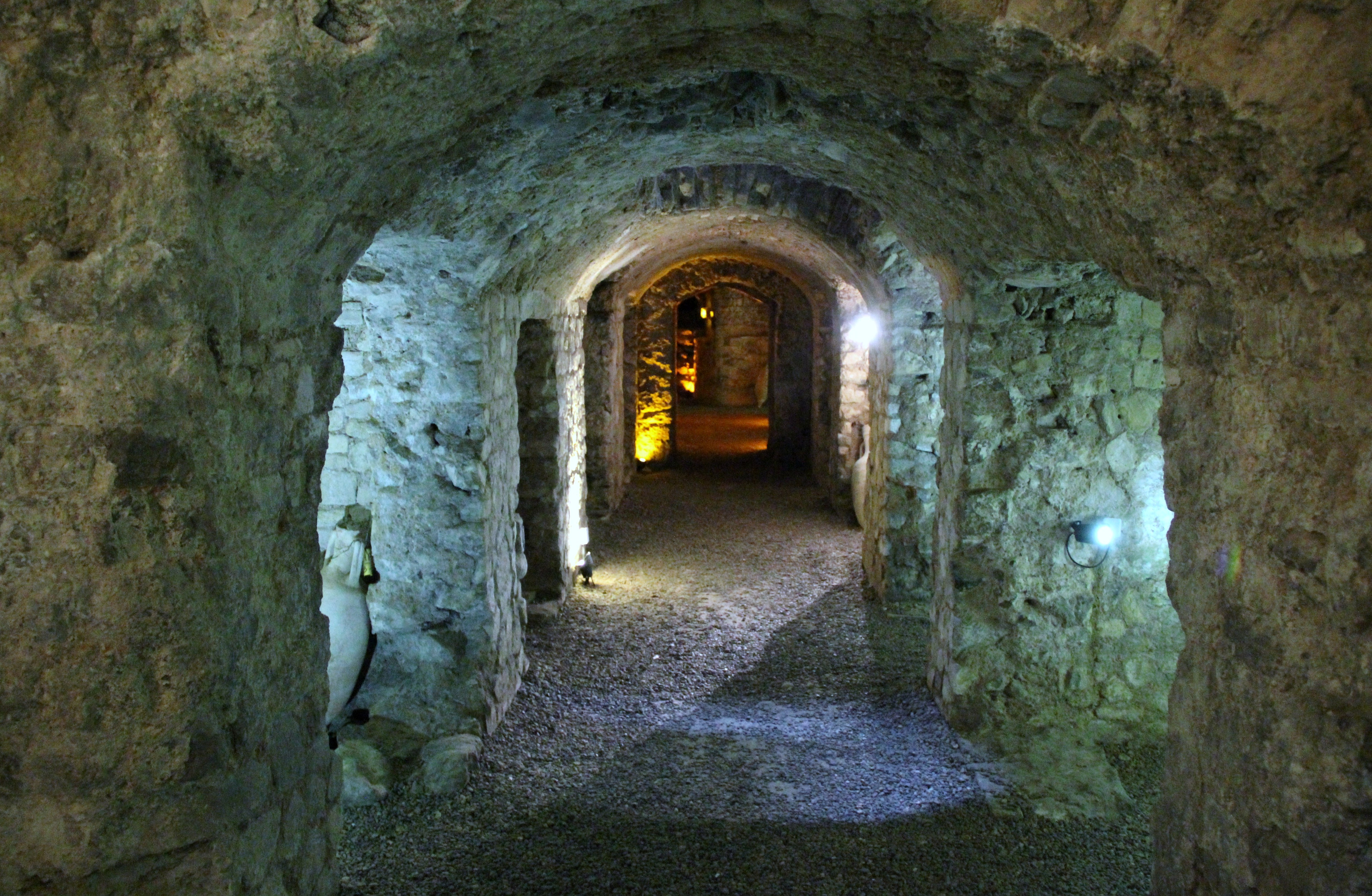 Galerie de l'Horreum .